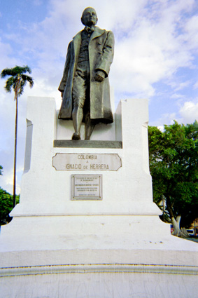 Plano Medio. En la imagen se destaca un pedestal blanco elaborado en concreto y sobre el la estatua en bronce de un prócer colombiano de nombre Ignacio de Herrera. Al fondo un árbol frondoso y el cielo algo nublado resaltan aún más la imagen.